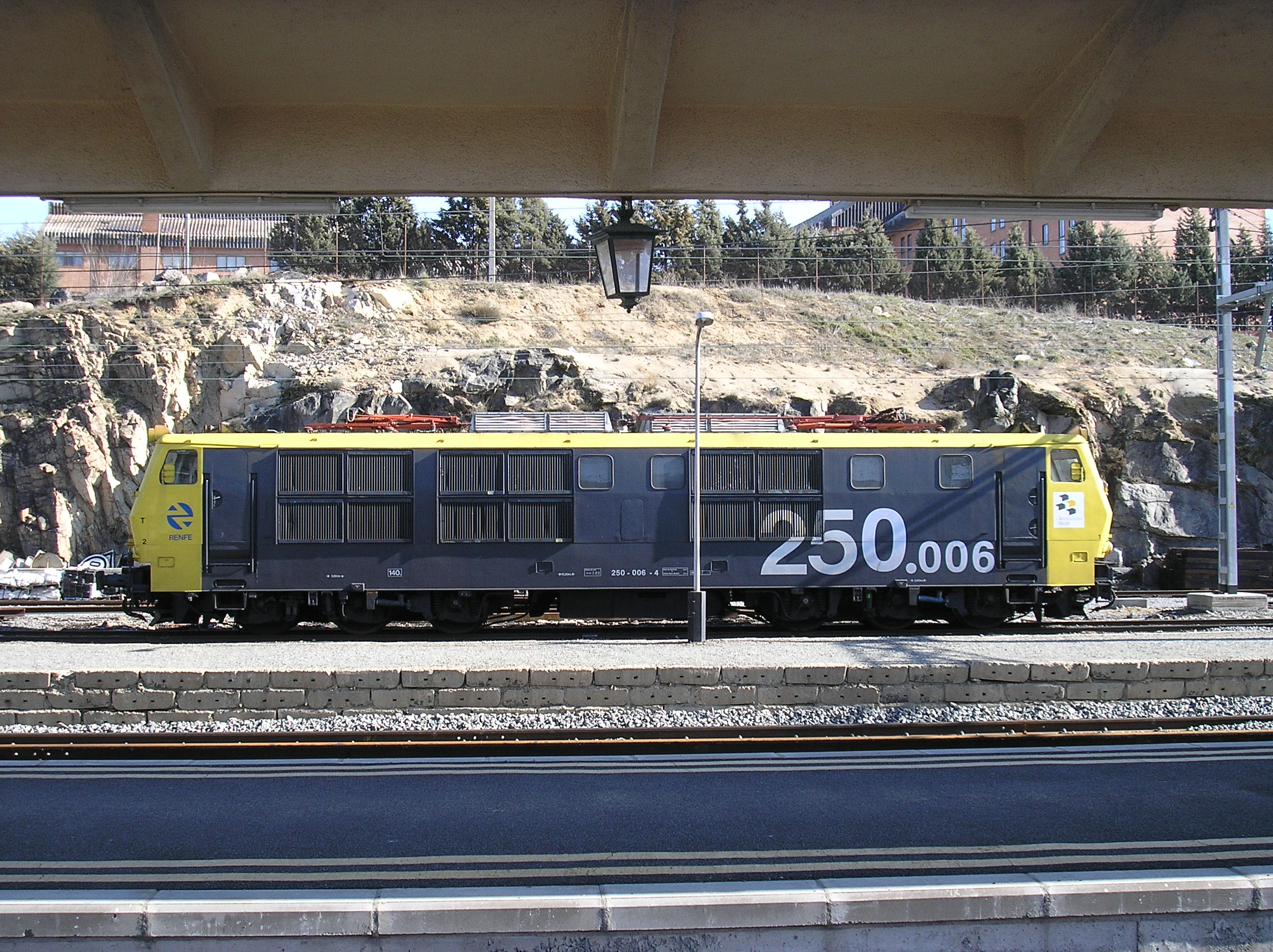 Locomotora eléctrica de la serie 250 (250-006-4) estacionada en Ávila.